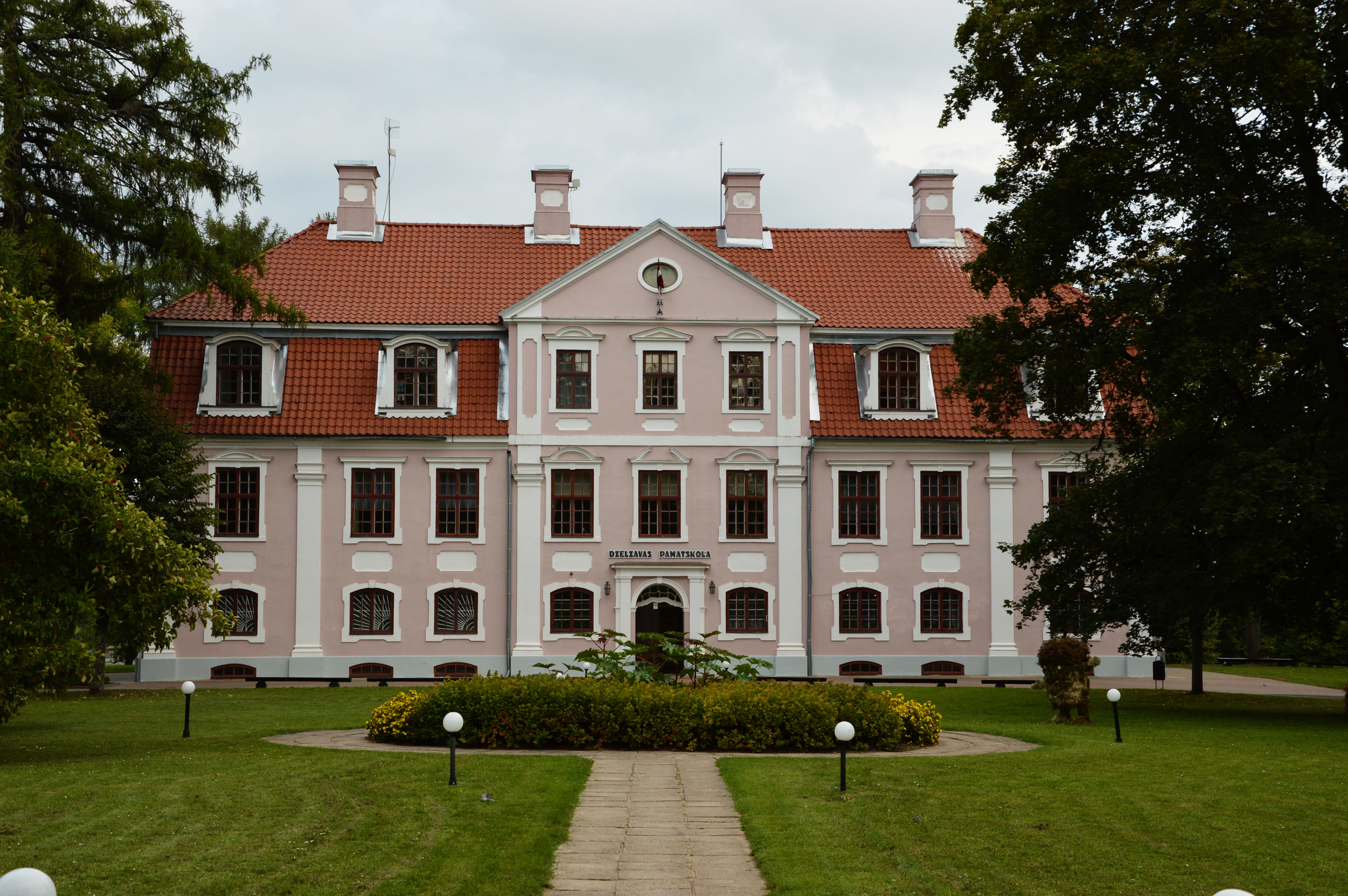 Dzelzava mõis